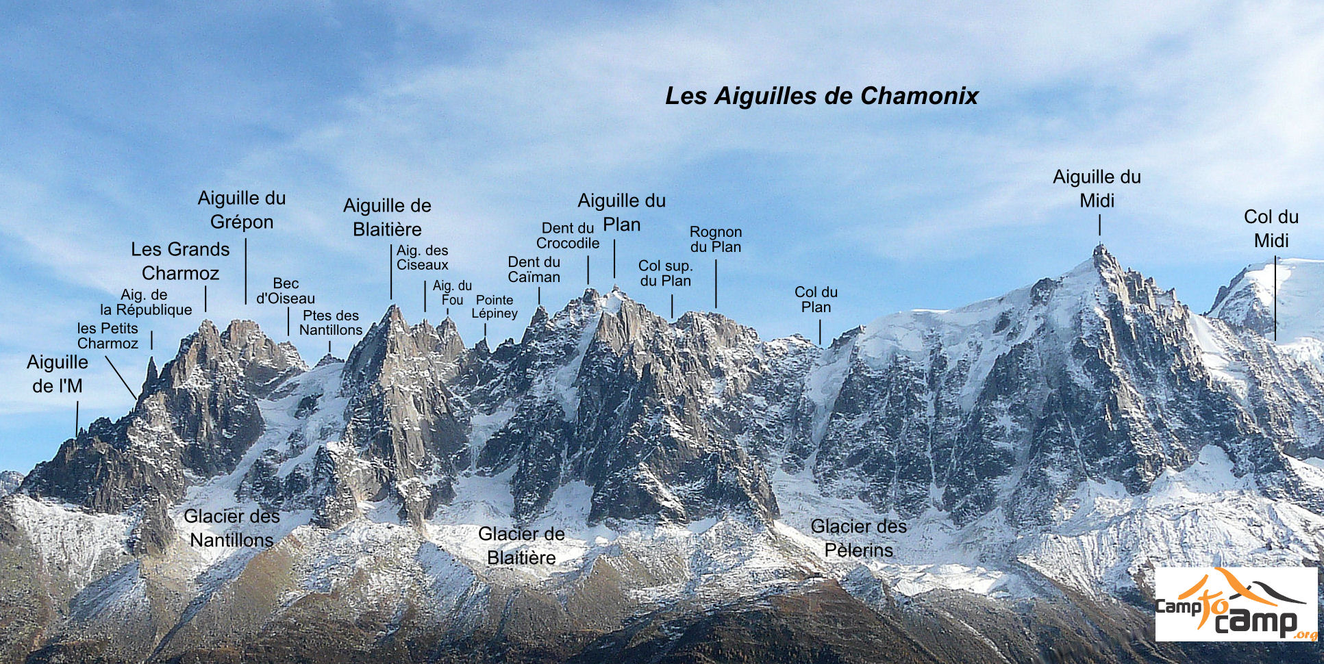 Panorama delle Aiguilles de Chamonix con indicati i nomi delle principali vette